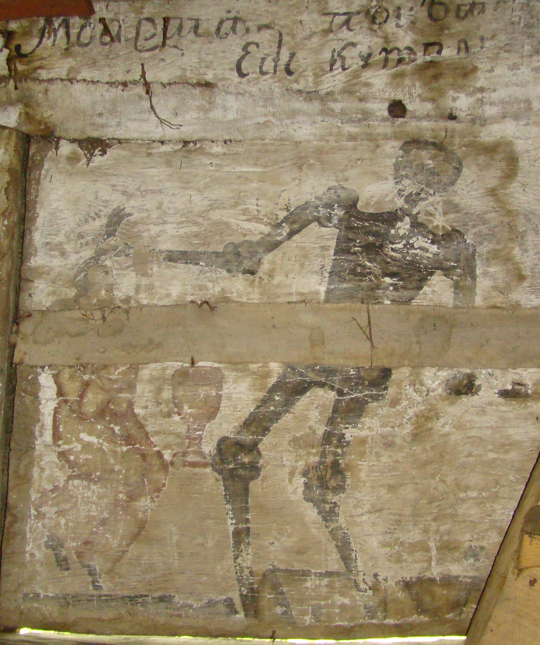 Biserica de lemn „Sfinții Arhangheli” din Berindu, județul Cluj